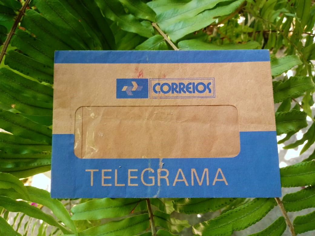 Envelope do Telegrama do Correio do Brasil em 1994.